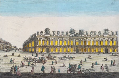 Prospectus armamentarii regii versus arcem principis regis haereditarii Berolini (Zeughaus in Berlin)